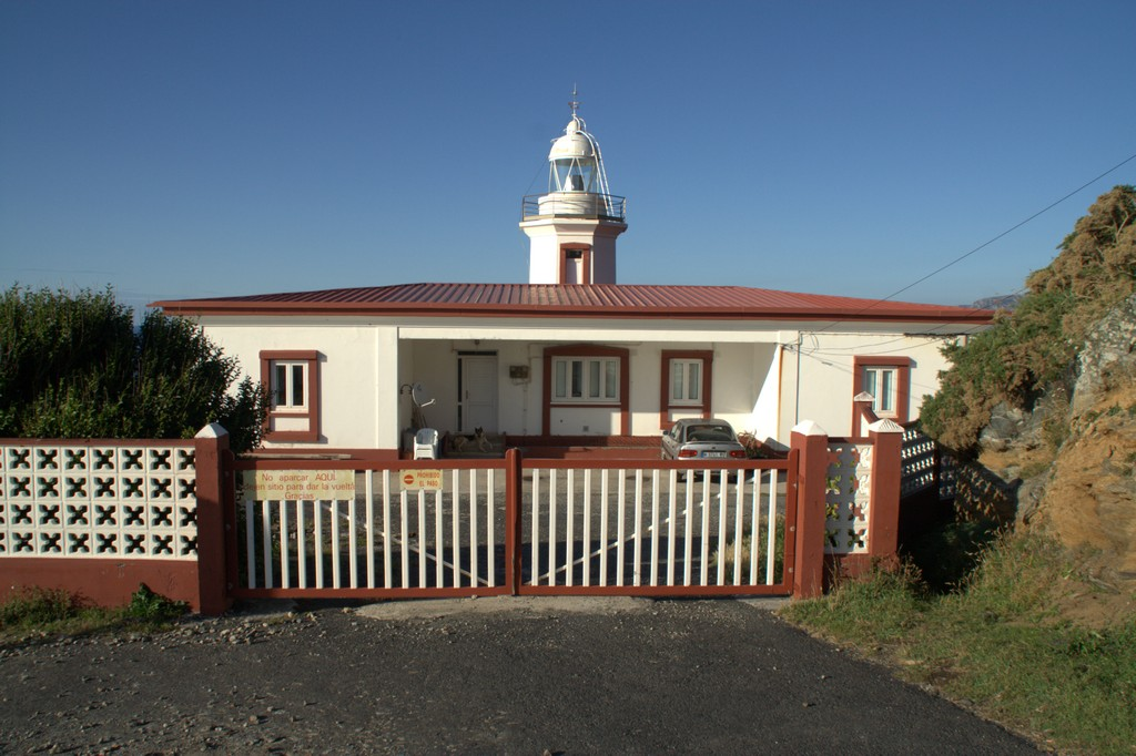 Faro Punta Candelaria (Cedeira, Spain)